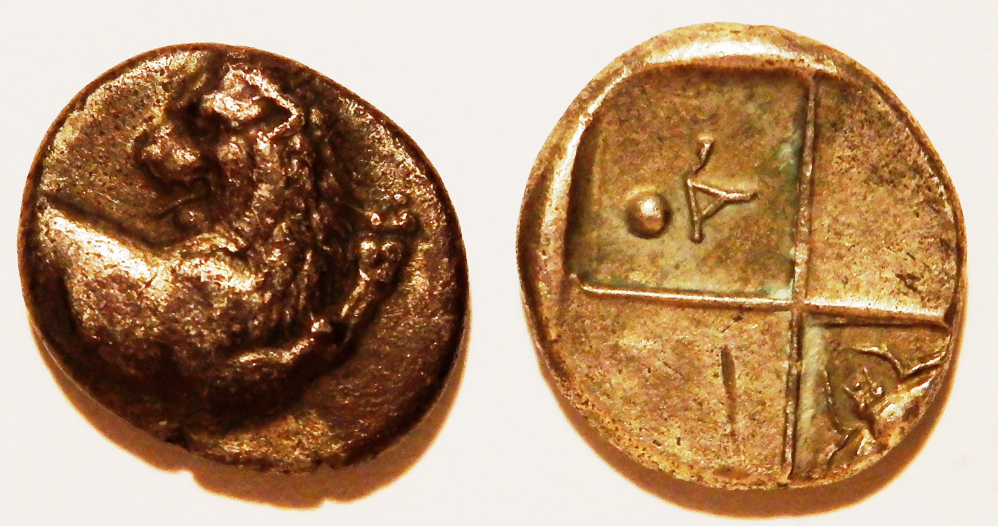 zwei Triobole aus Chersones, zwischen 400-350 v.Chr. geprägt, Löwe, Incusum